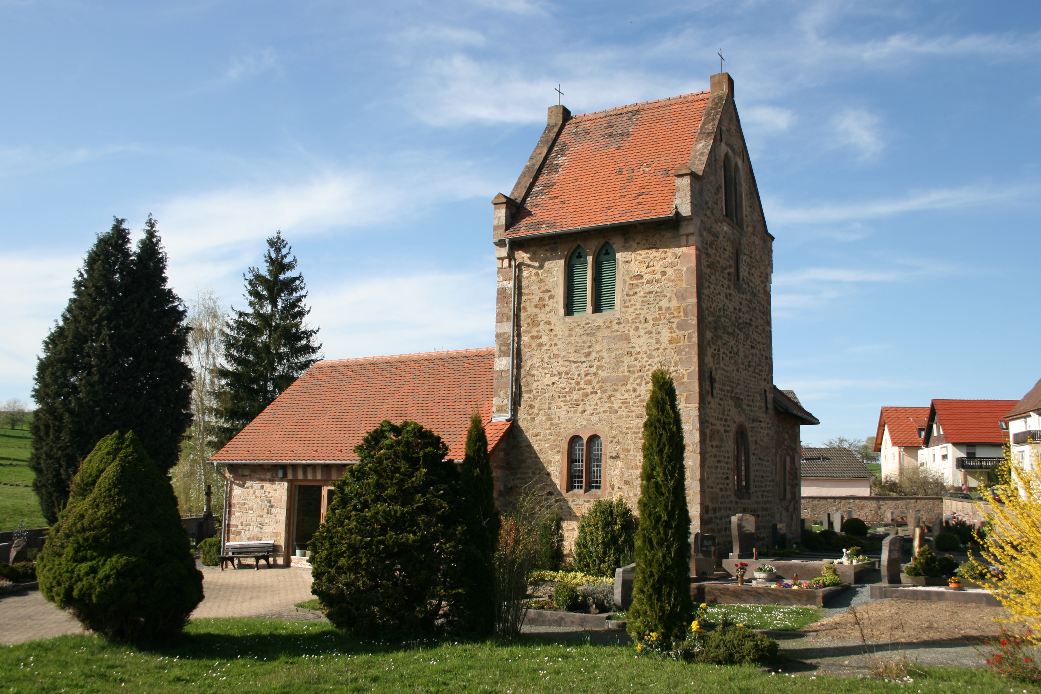 Evangelische Kirche in Rehbach (OT von Michelstadt), Odenwaldkreis, Hessen, ersterwähnt 1113.